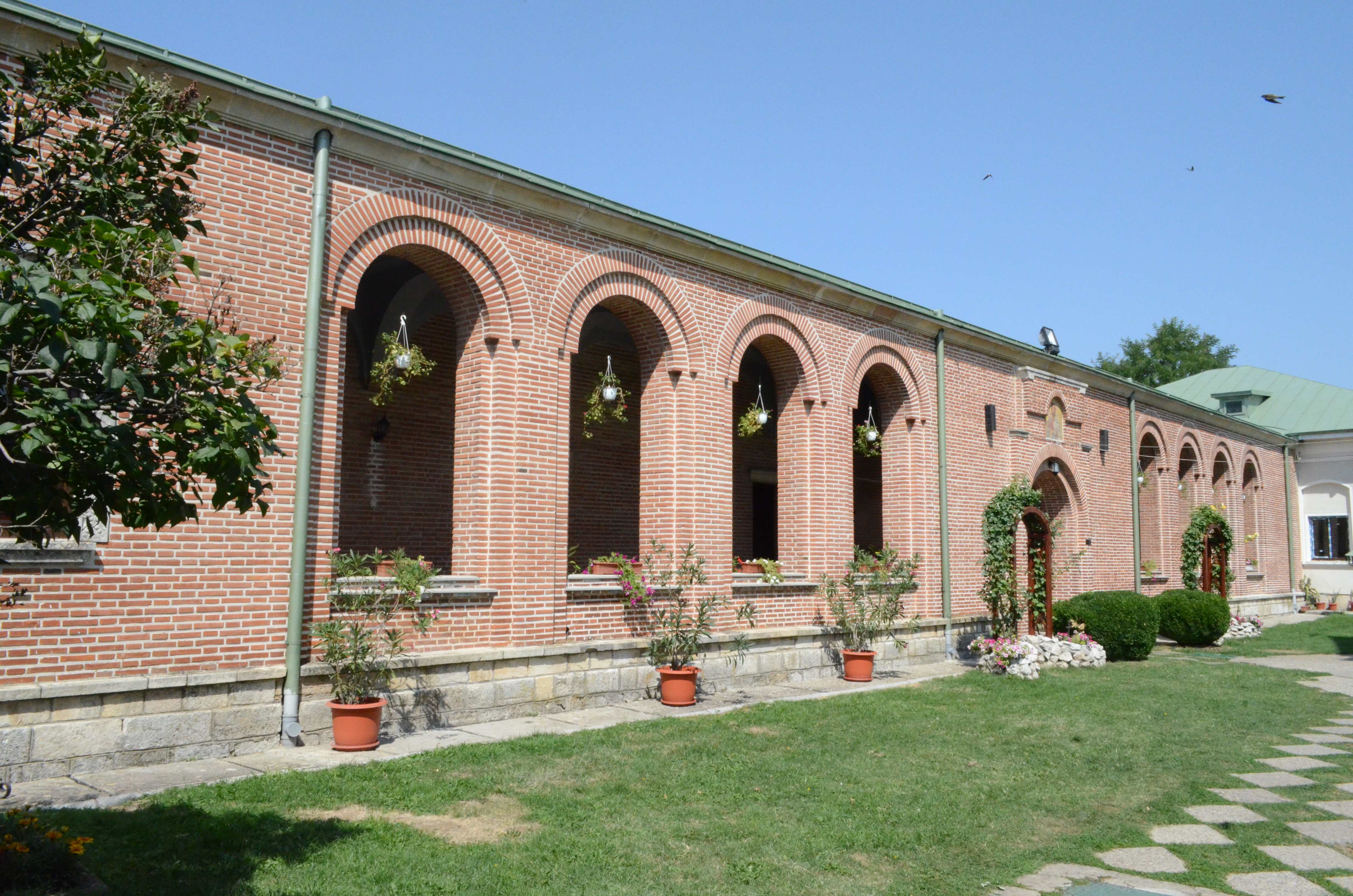 Chiliile Mănăstirii Dealu, lângă Târgoviște 02